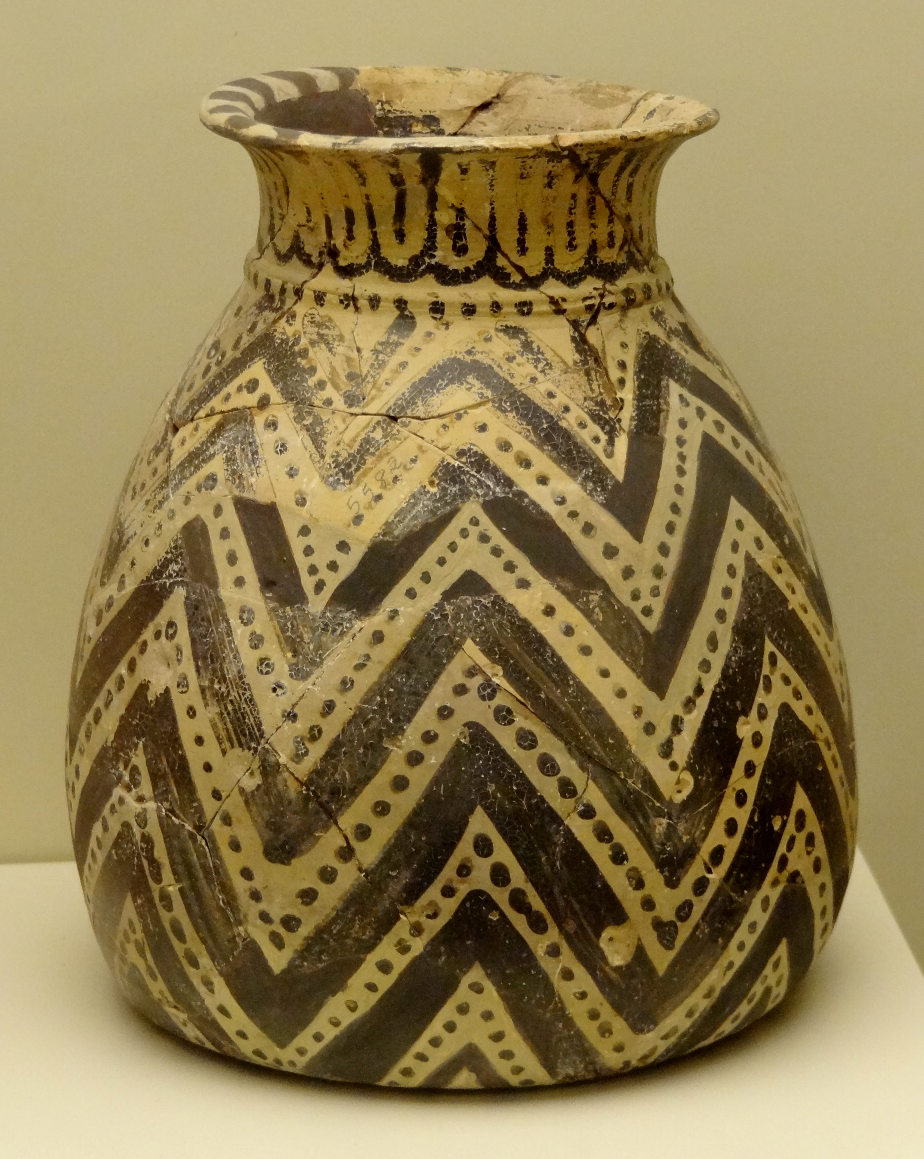 Tonalabastron mit Zickzackreihenbemalung (Neupalastzeit, SM I B, 1500–1450 v. Chr.), gefunden 1909 im westlichen Haus von Block B in Mochlos, ausgestellt im Archäologischen Museum Iraklio, Kreta, Griechenland